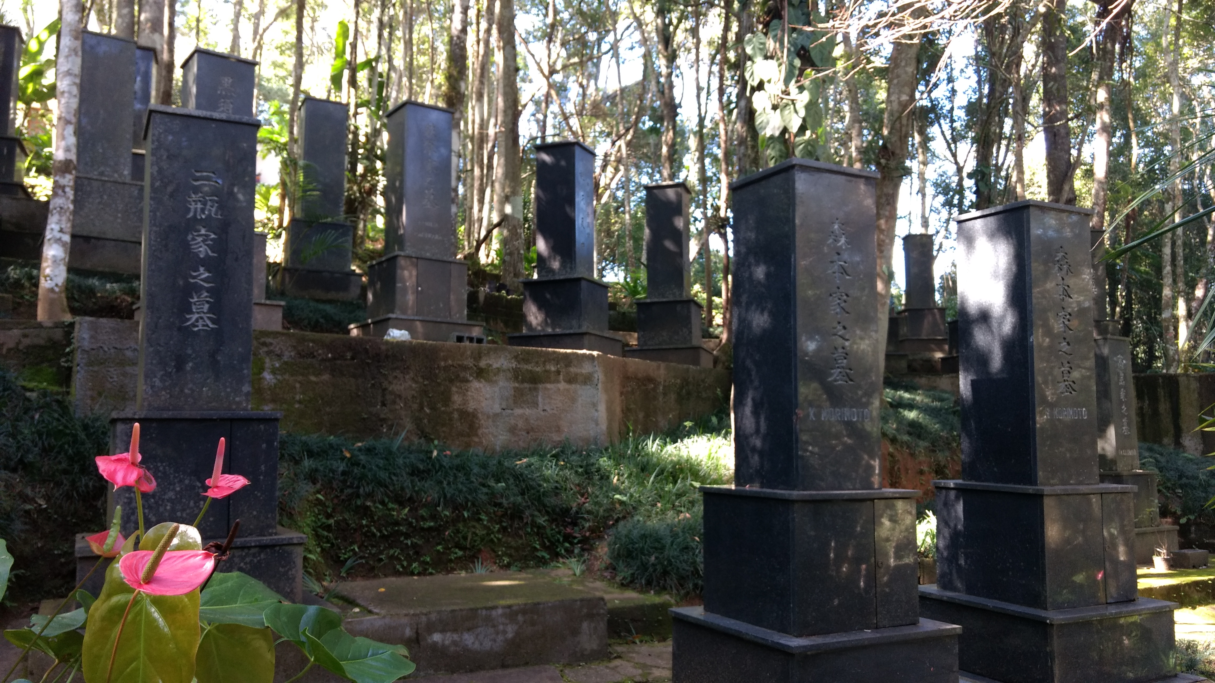 O Kinkaku-ji do Brasil é uma réplica do templo Kinkaku-ji japonês de mesmo nome construído no século XIV e assim como seu modelo, o Kinkaku-ji é entornado por um lago povoado por carpas coloridas (nishikigois). Fica no município de Itapecerica da Serra a trinta e três quilômetros da capital de São Paulo. Diferentemente do seu modelo japonês, o Kinkaku-ji do Brasil é um templo ecumênico e um cinerário, ao passo que o Kinkaku-ji japonês é um templo de orientação zen-budista.